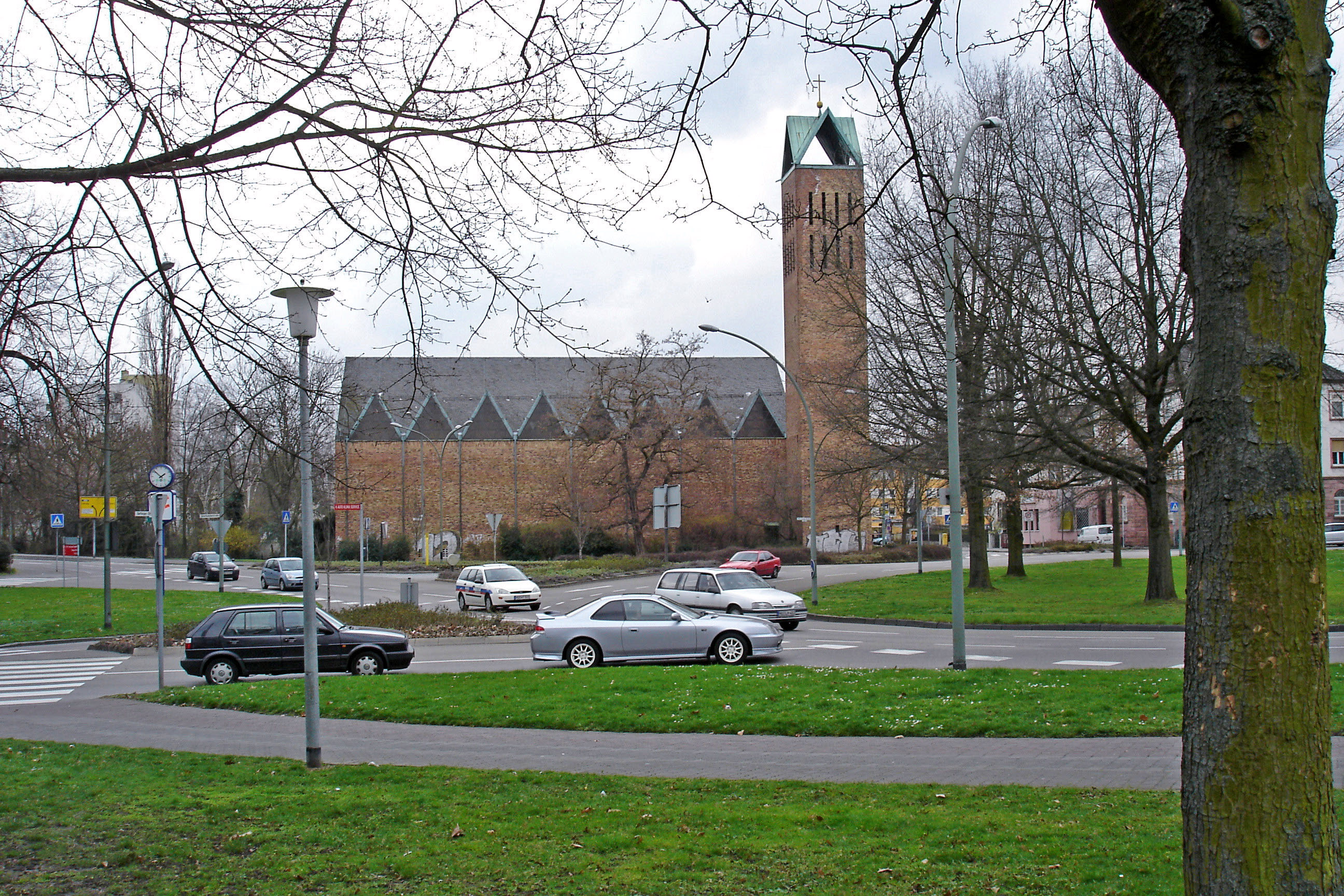 Evangelische Christuskirche am Kreisverkehr gegenüber dem Hanauer Hauptfriedhof.